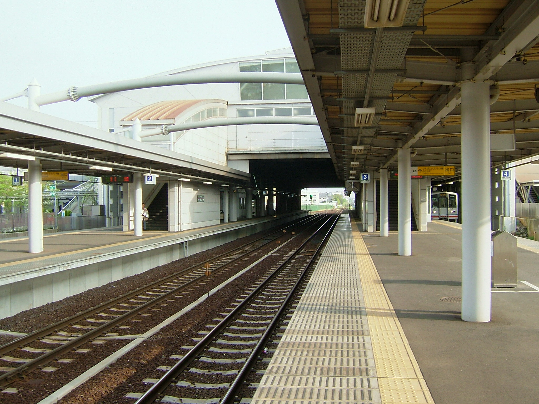 関東鉄道常総線守谷駅プラットホーム